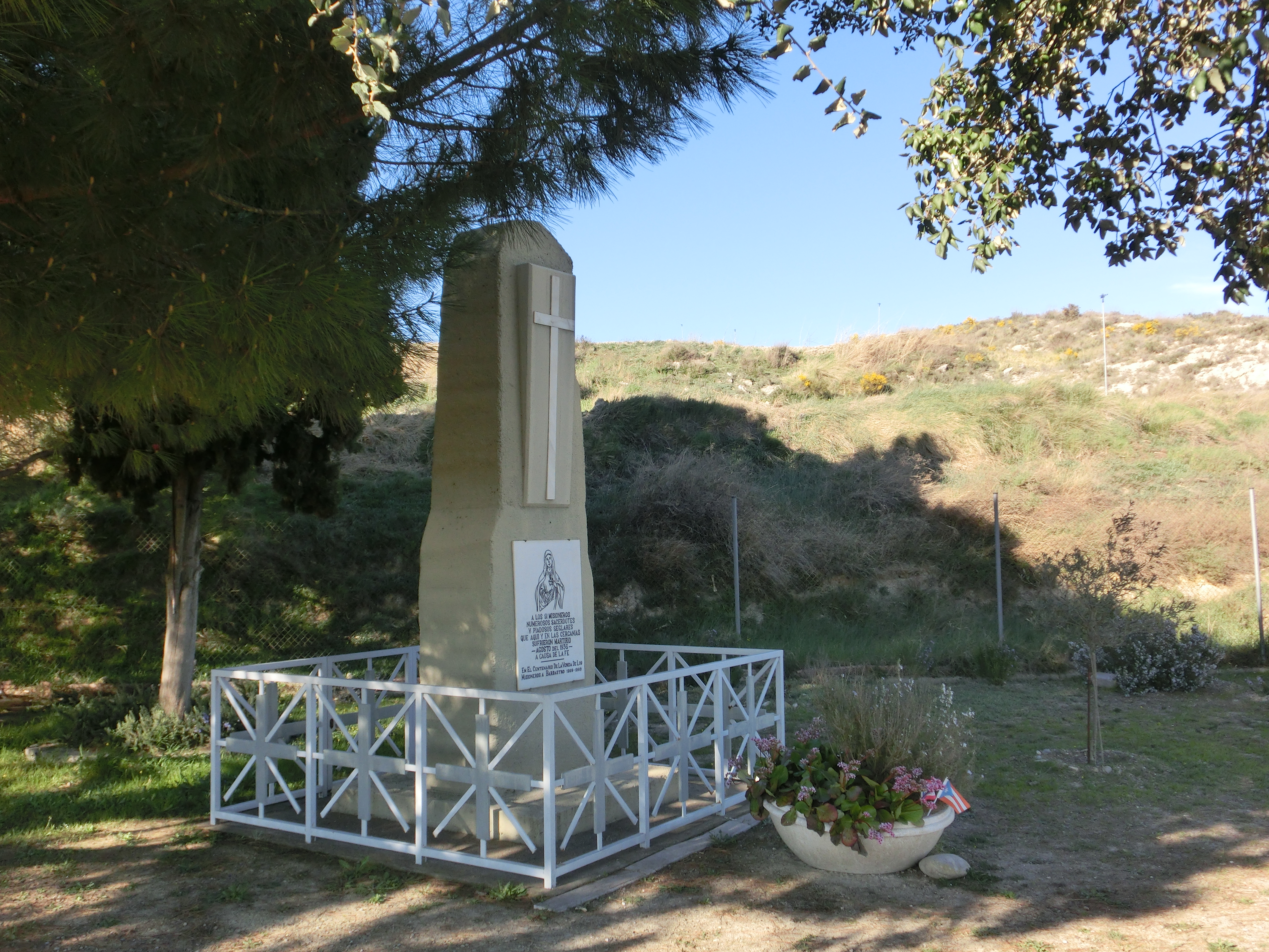 Monumento che ricorda i Martiri claretiani di Barbastro nel luogo dove sono avvenute le fucilazioni di due gruppi di essi